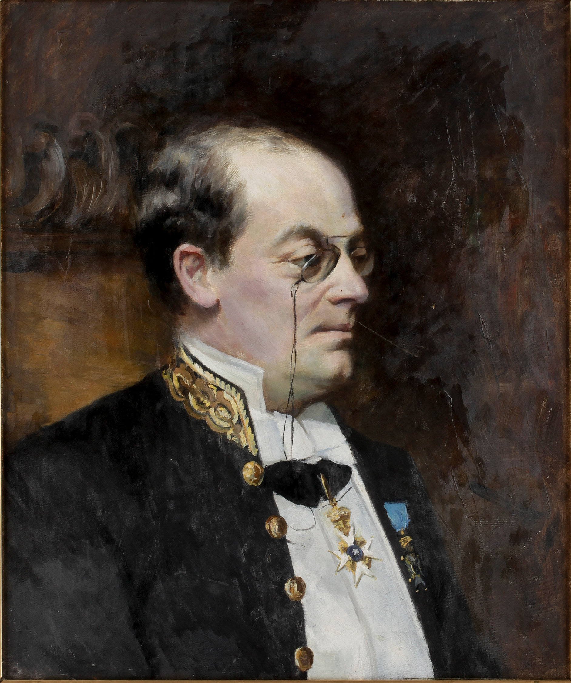 Swedish Minister of Finance Hans Hansson Wachtmeister (1851-1929)label QS:Len,"Swedish Minister of Finance Hans Hansson Wachtmeister (1851-1929)" label QS:Lsv,"Finansminister Hans Hansson Wachtmeister (1851-1929)"